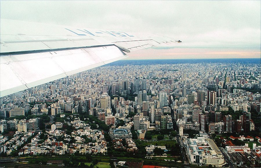 Blick über Buenos Aires, geschossen von: Roland Lubiger im Februar 2003